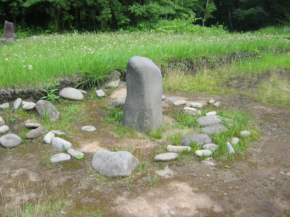 小牧野遺跡（青森県青森市）、Sapphire撮影 Komakino Iseki, Aomori, Aomori, Japan